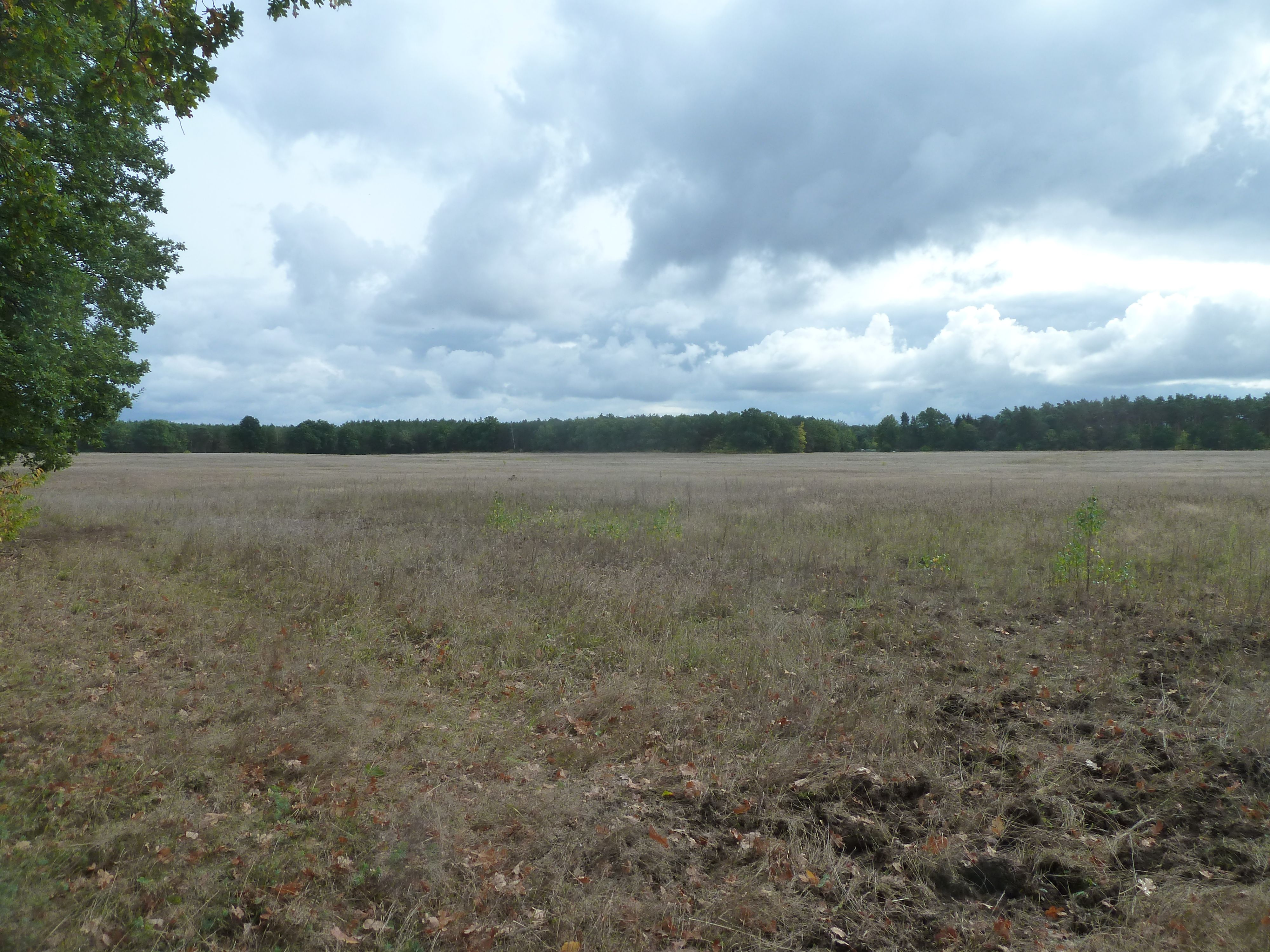 Frühere West-Berliner Exklave Wüste Mark, heute auf dem Gebiet der Gemeinde Stahnsdorf, Blick von Südwesten.